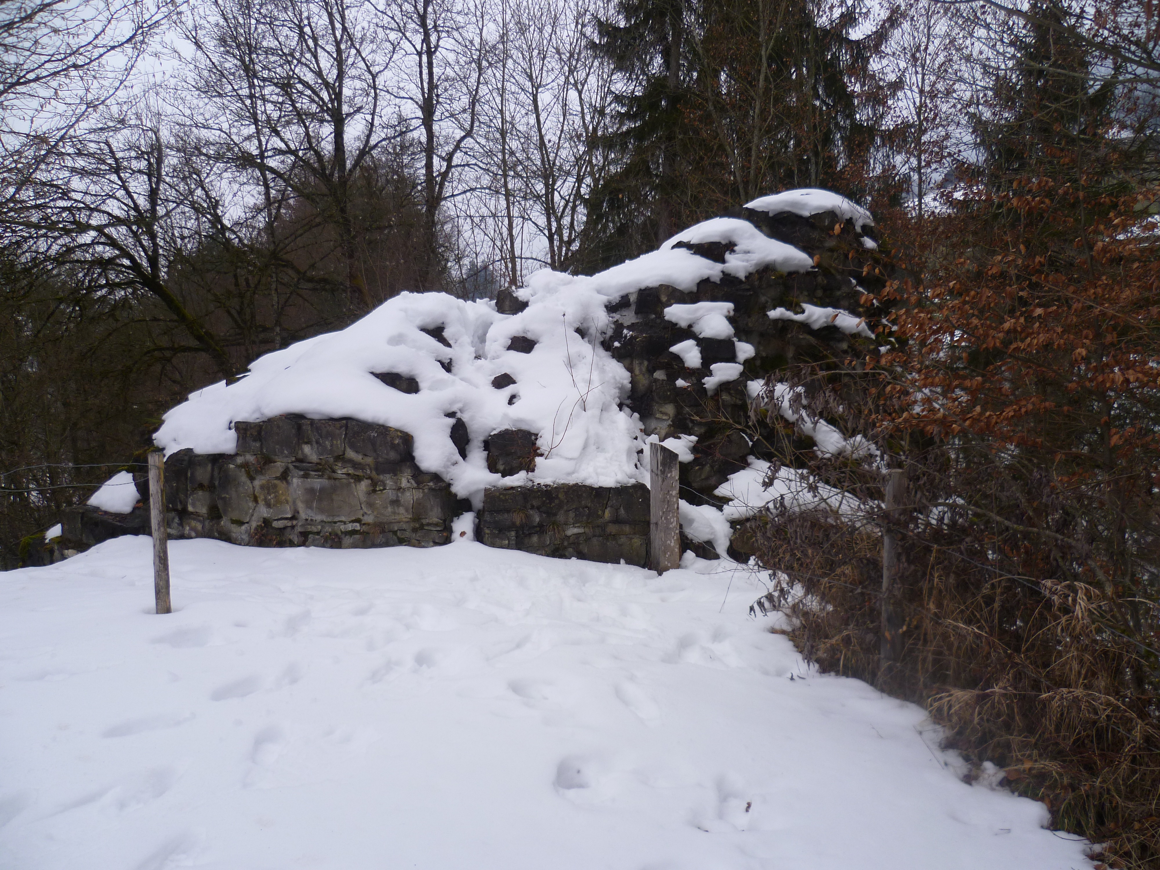 Der Rundturm der Burgruine Weissenburg mit einem Durchmesser von ca. 9 Meter und einem 2,5 Meter starken Mauerwerk.